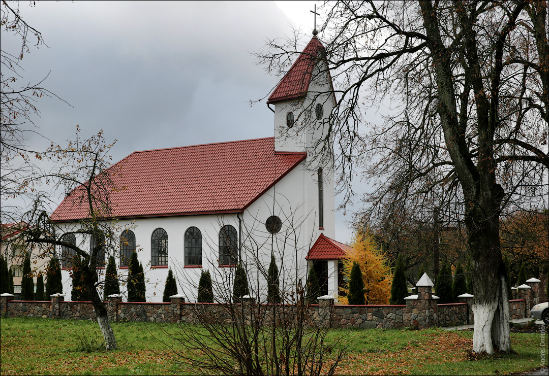 Свіслач. Каталіцкая капліца